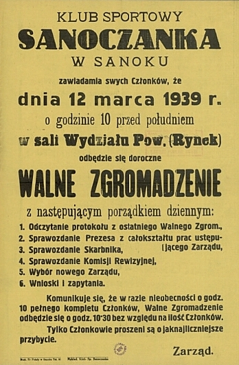 Sanoczanka Sanok, walne zgromadzenie (1939-03-12)